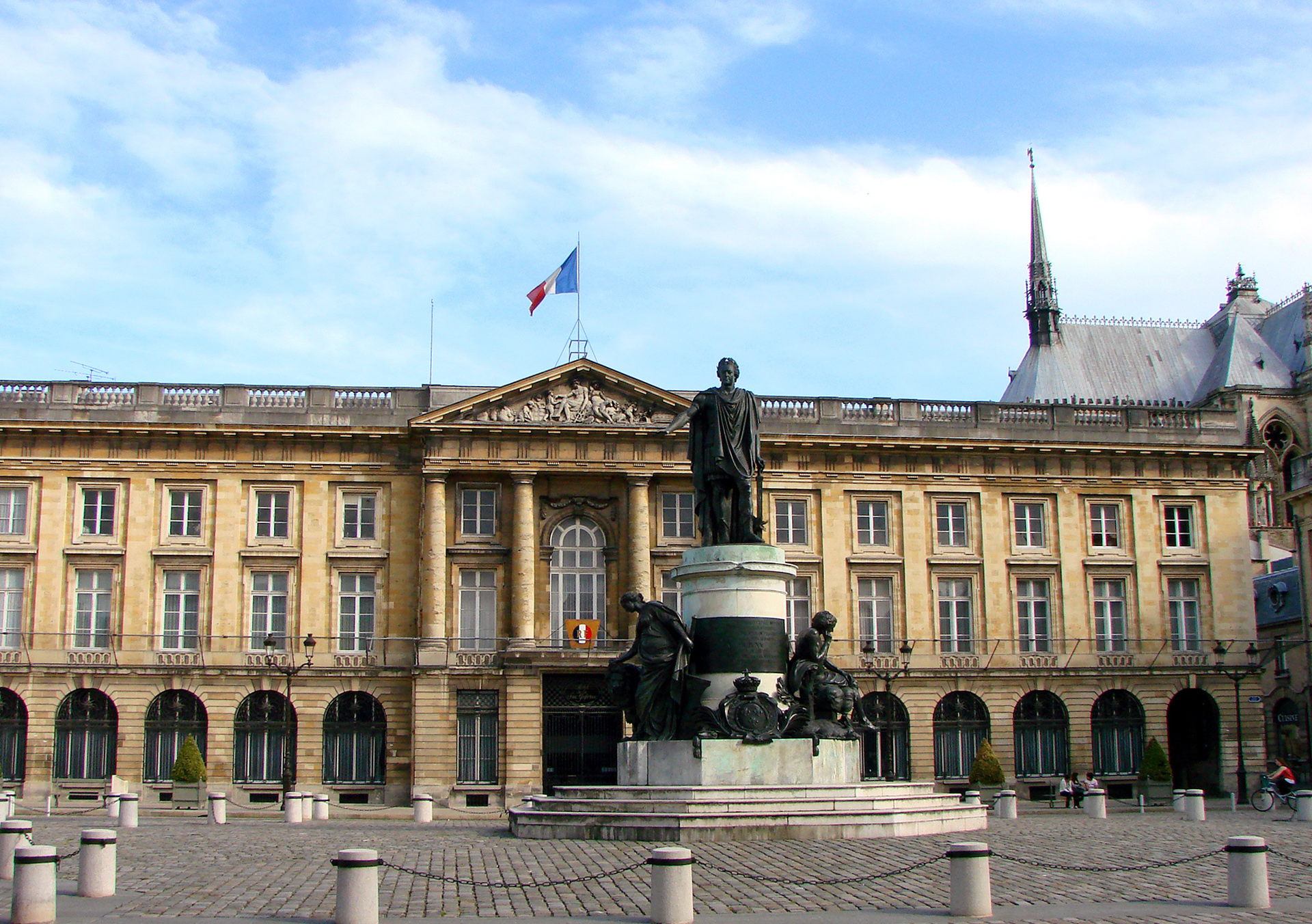 Place Royale de Reims avec la statue de Louis XV par Cartellier (1818); les groupes du piédestal sont de Pigalle (1765). Le plan de la place a été dessiné par Jean Gabriel Legendre; les travaux ont duré de 1756 à 1760. Derrière la statue, on peut voir l'Hôtel des Fermes, qui abrite actuellement la sous-préfecture.